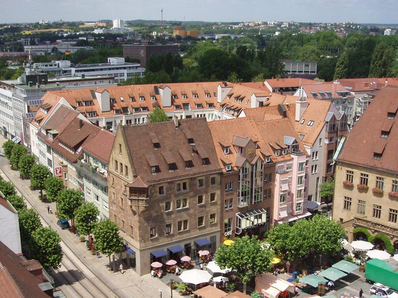 Der „Käthchenhof“ in Heilbronn mit dem Betrachter entgegengewandten Eckhaus, dem historischen Käthchenhaus. Rechts daneben noch teilweise sichtbar das Heilbronner Rathaus.